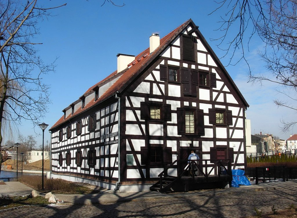 Biały Spichlerz na Wyspie Młyńskiej w Bydgoszczy